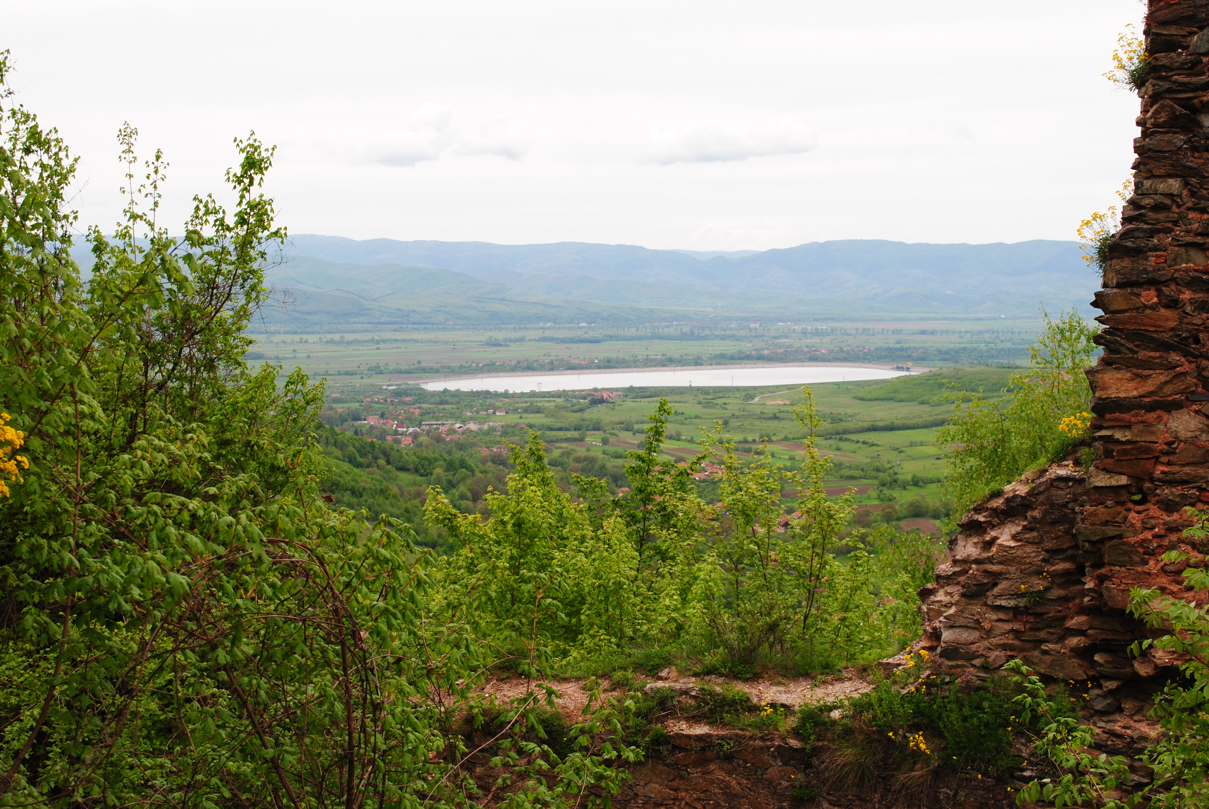 Cetatea cnezială a Cândeștilor (Cetatea de Colț) sec. XV